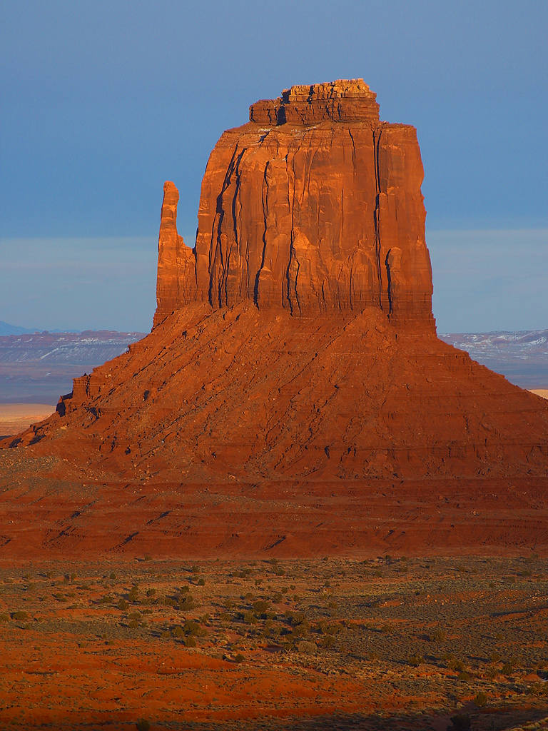 Monument Valley, Arizona, États-Unis